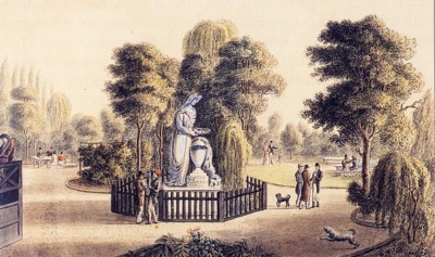 Denkmal für Gottfried August Bürger. Geschaffen von den hessischen Hofbildhauern Ludwig Daniel Heyd und Johann Wolfgang Heyd (Brüder) in Göttingen. Leider wurde es 1956 abgerissen und zerstört.